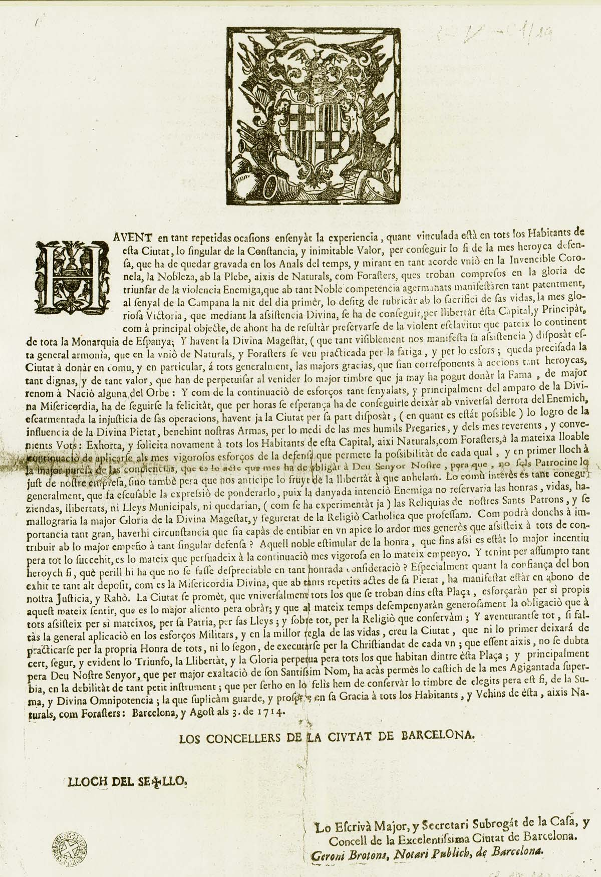 Buenas relaciones entre Naturales y Forasteros en Barcelona